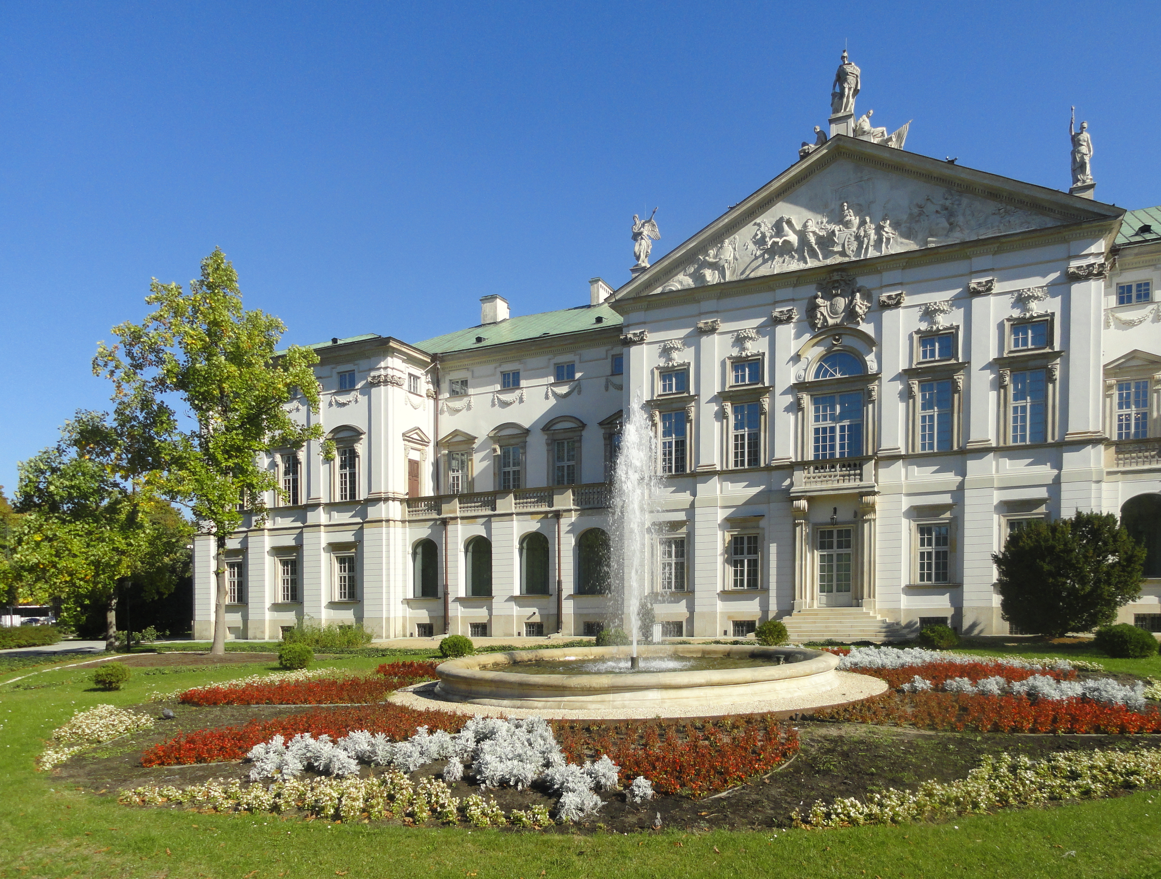 Pałac Krasińskich w Warszawie od strony ogrodu.